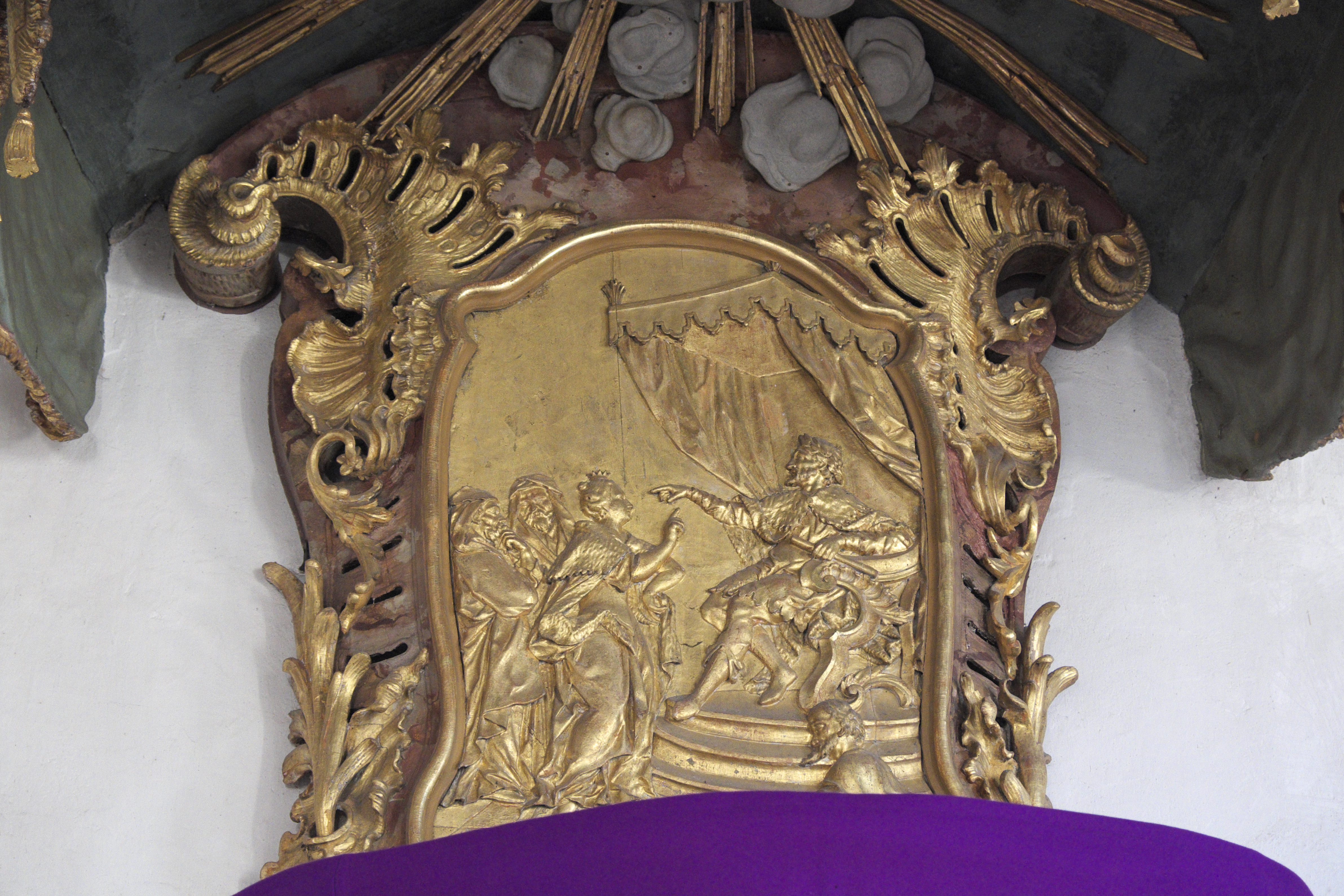 Katholische Pfarrkirche St. Petrus und Paulus in Halsbach, einem Ortsteil von Dürrwangen im Landkreis Ansbach (Mittelfranken/Bayern), Kanzel um 1745/46 mit Rocailleschnitzerei, Relief an der Kanzelrückwand, Darstellung: Königin Ester und Ahasveros